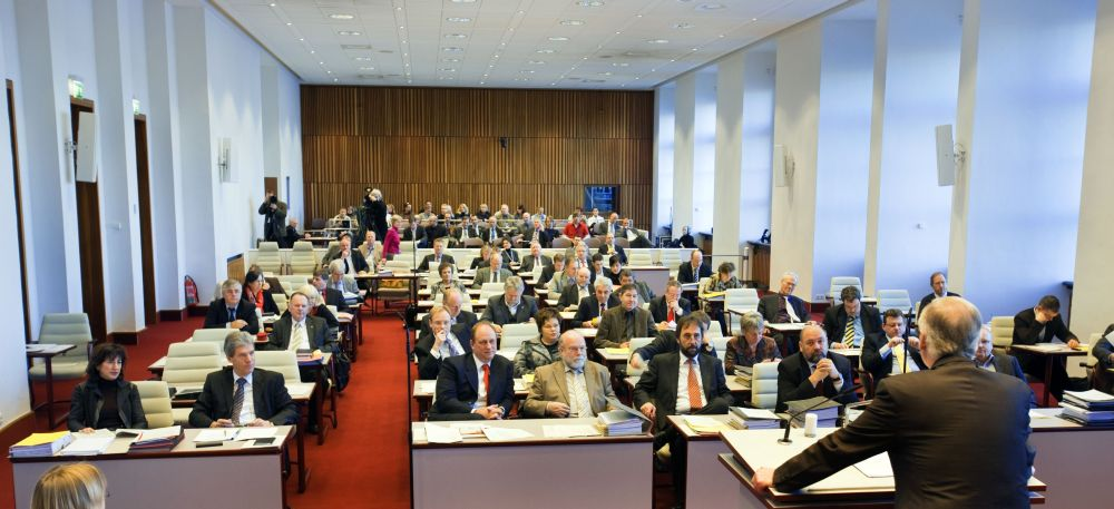 Plenarsaal des Landtages Mecklenburg-Vorpommern 1990-2017